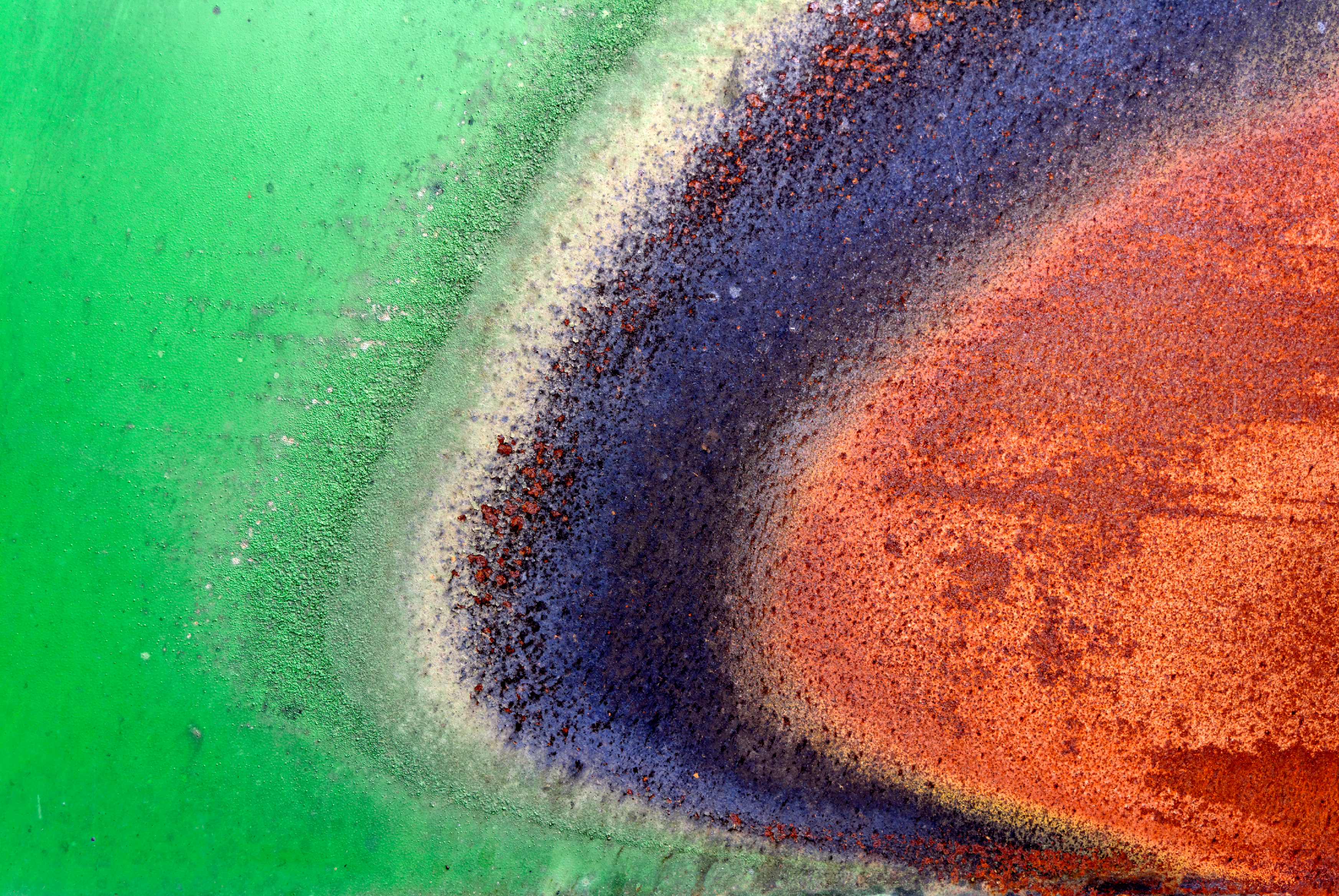 Corrosion